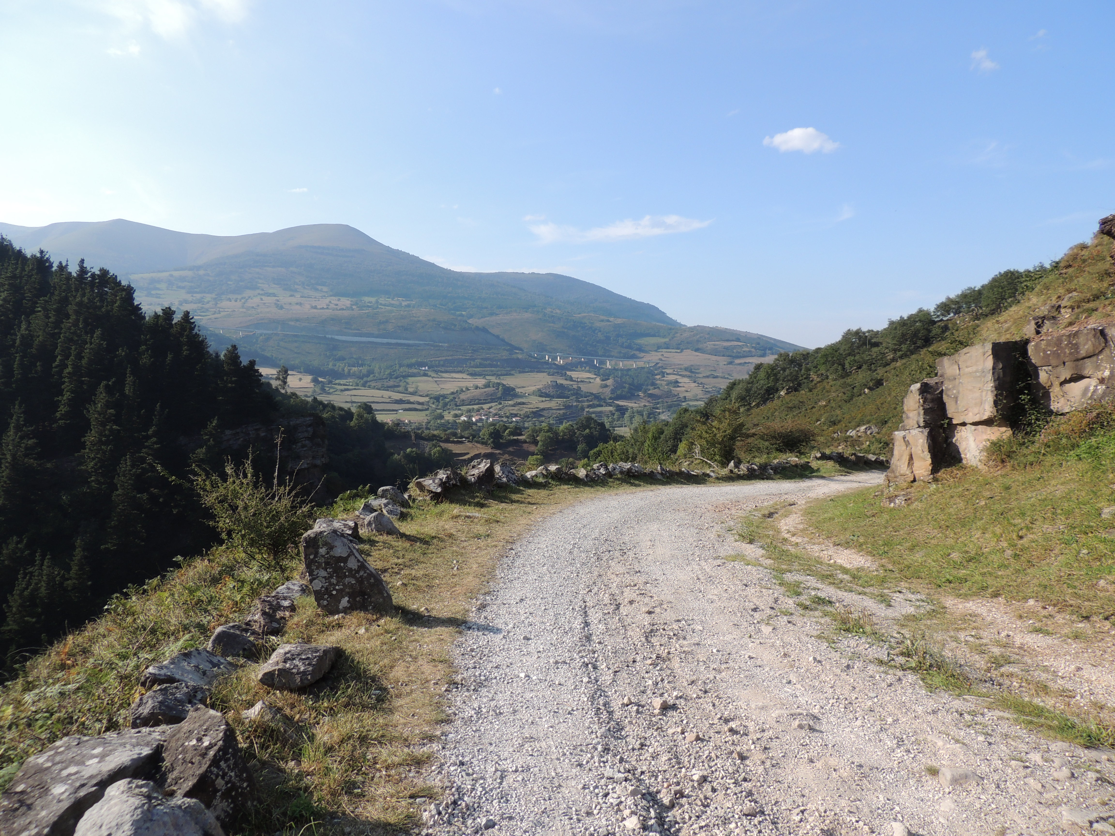 Antigua carretera que unía la meseta castellana con el Mar Cantábrico.